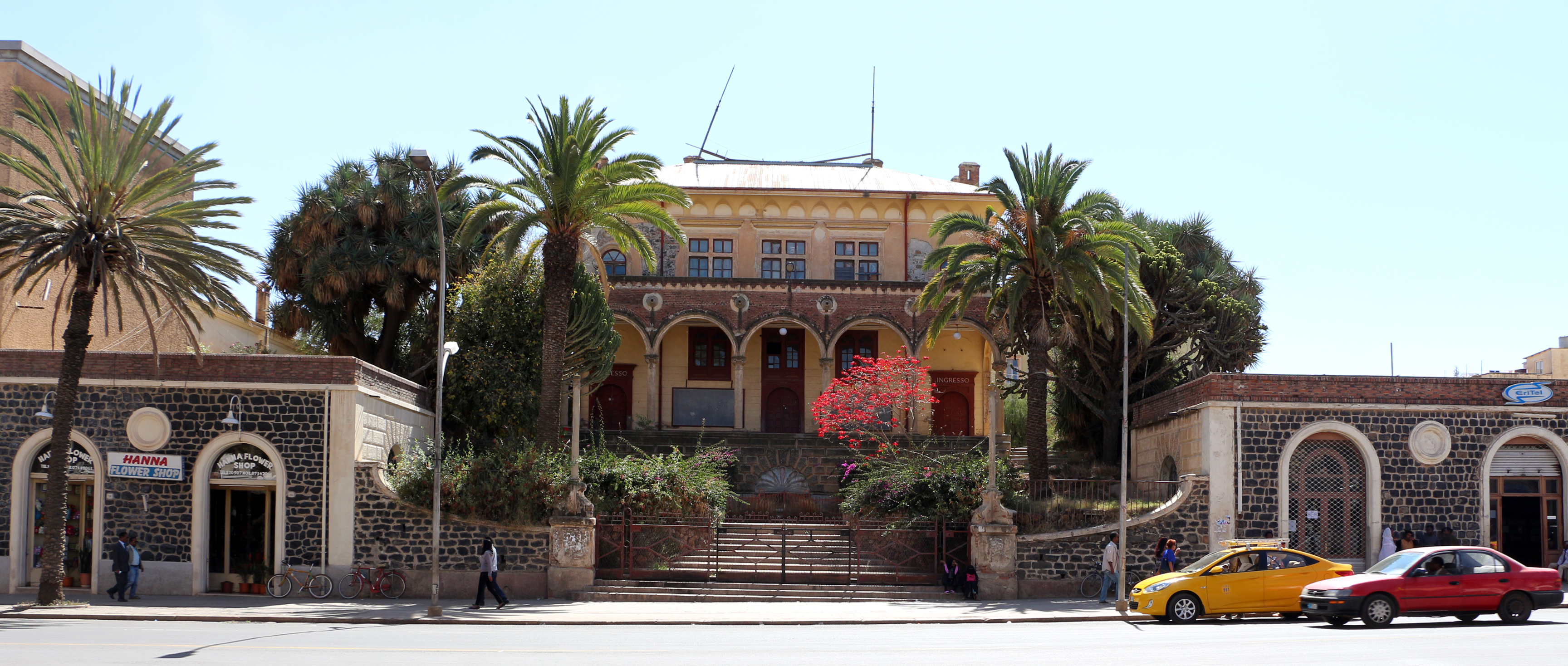 Asmara, teatro d'opera, 02.JPG